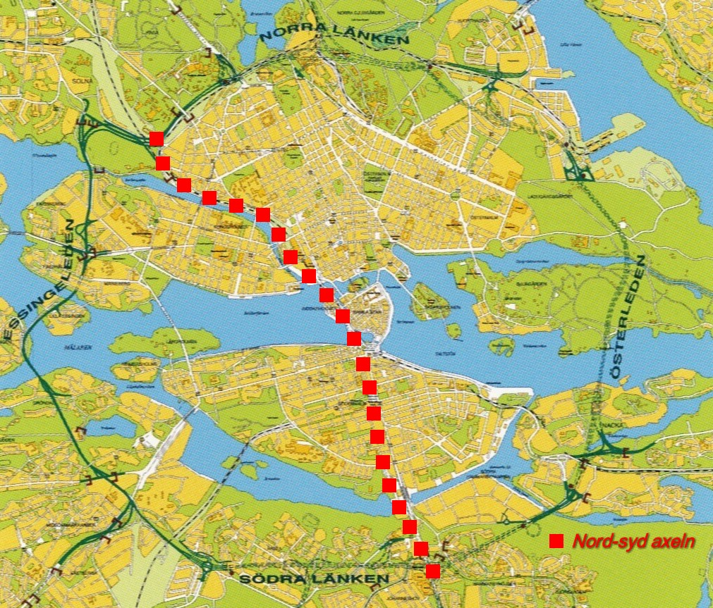 Stockholms ringled kompl med Stockholms nord-sydaxel